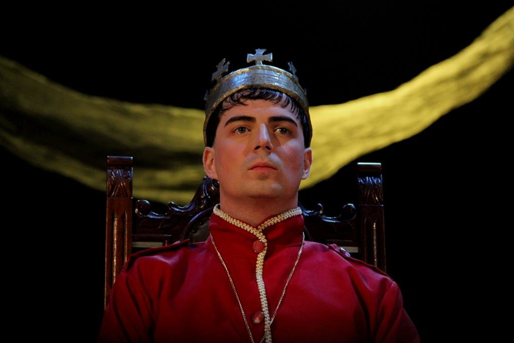 O ator Gabriel Marin na estréia da primeira produção do texto "Henrique V" no Brasil. Foto: Rogério Santos